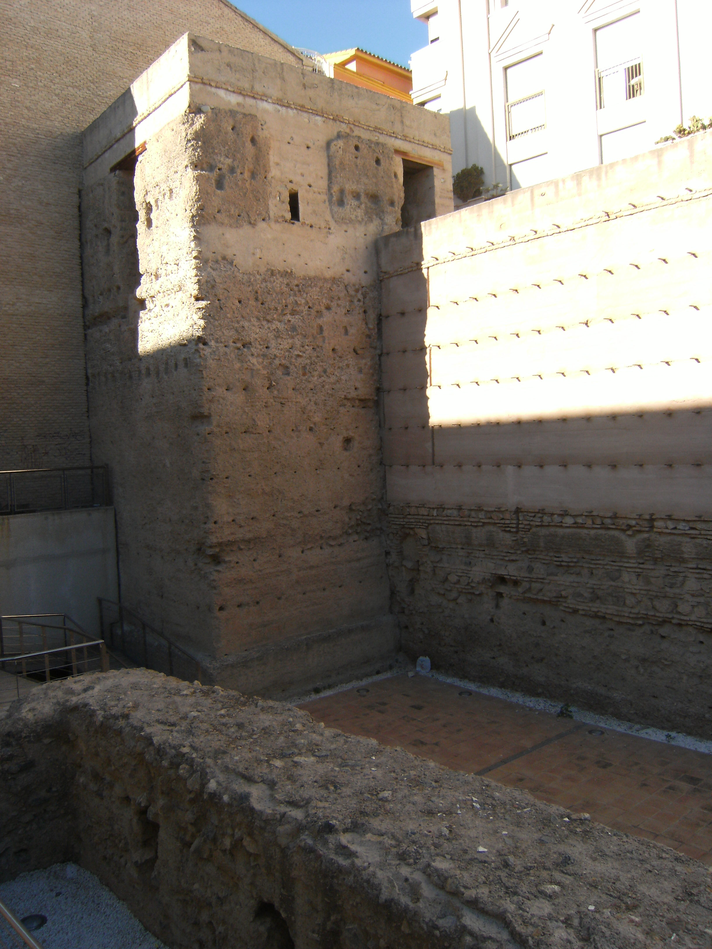 Torre, muralla y antemuralla musulmana de Murcia. Siglo XII.